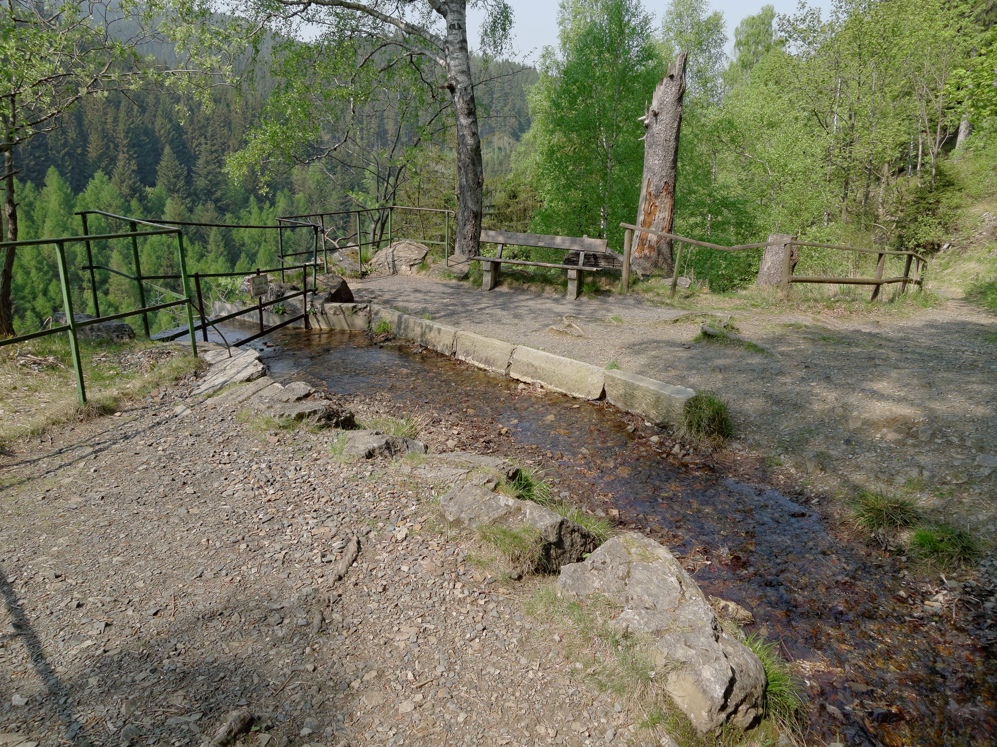 Der Zufluss zum Romker Wassefall